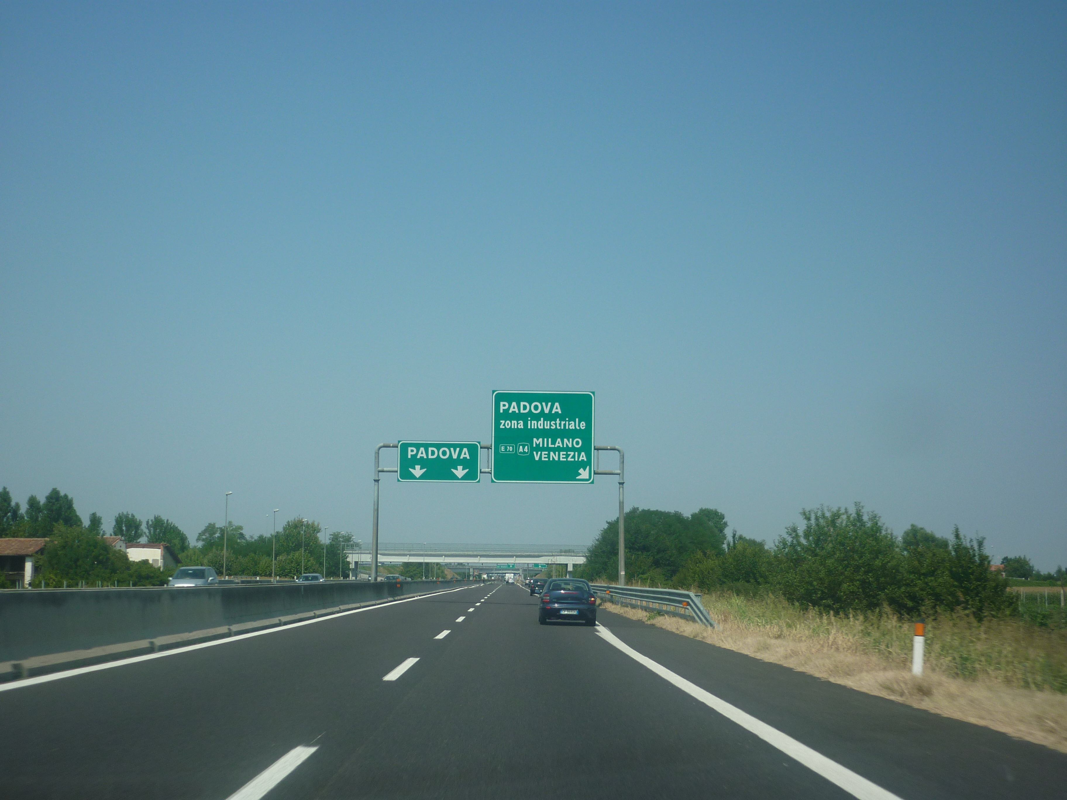 A13